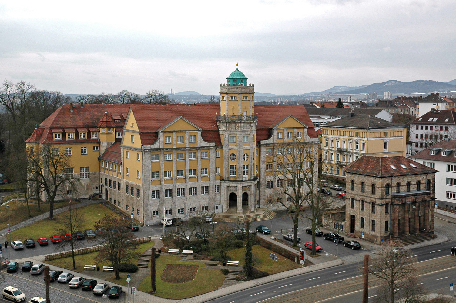 Beschreibung: Hessisches Landesmuseum Kassel, 2005 Quelle: selbst photografiert Fotograf oder Zeichner: Hafenbar 21:35, 27. Mär 2005 Hafenbar 1504 x 1000 (735361 Byte)